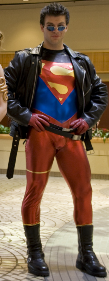 Taken during DragonCon 2007.